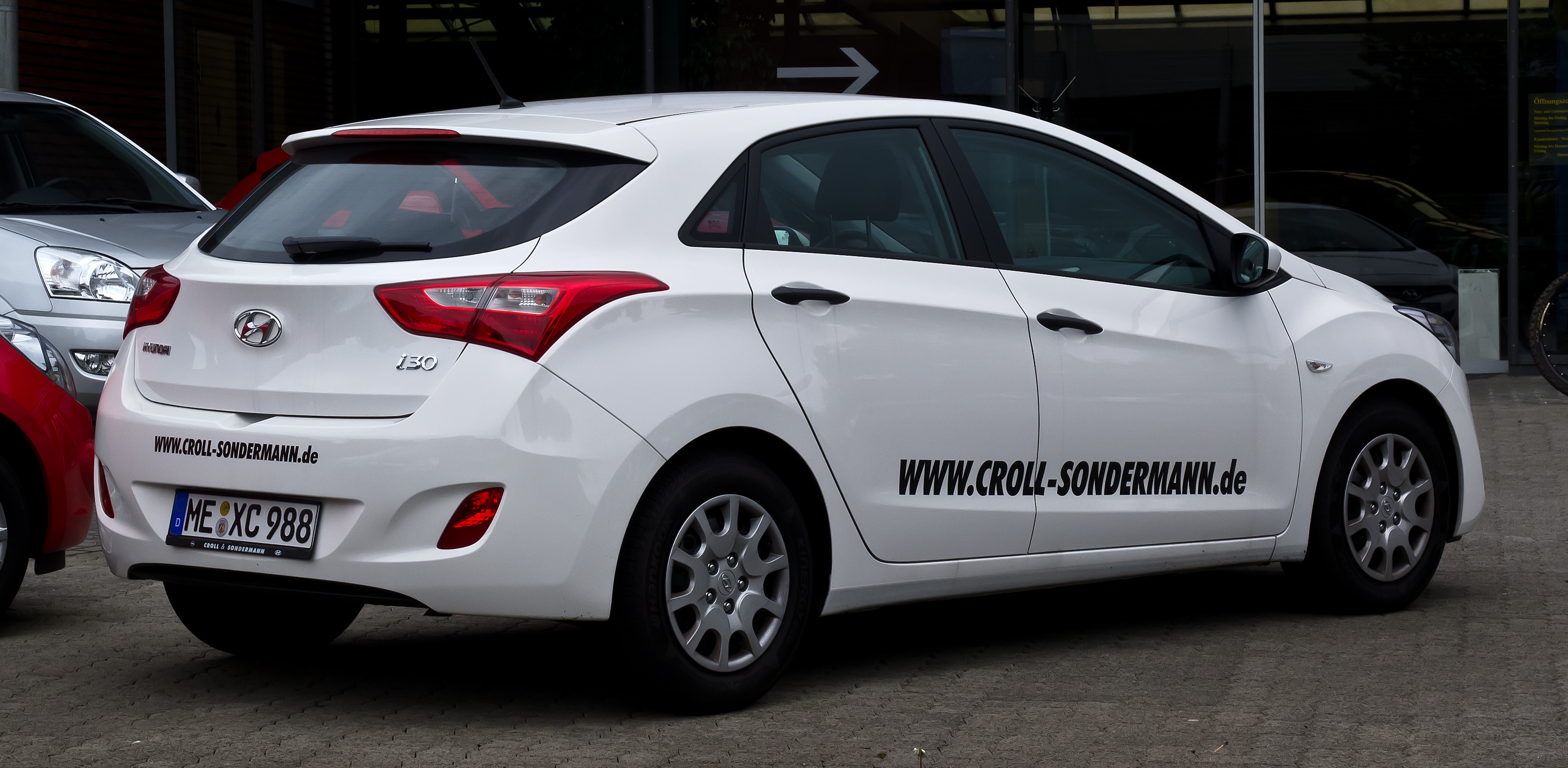 Hyundai i30 1.4 Classic (II)